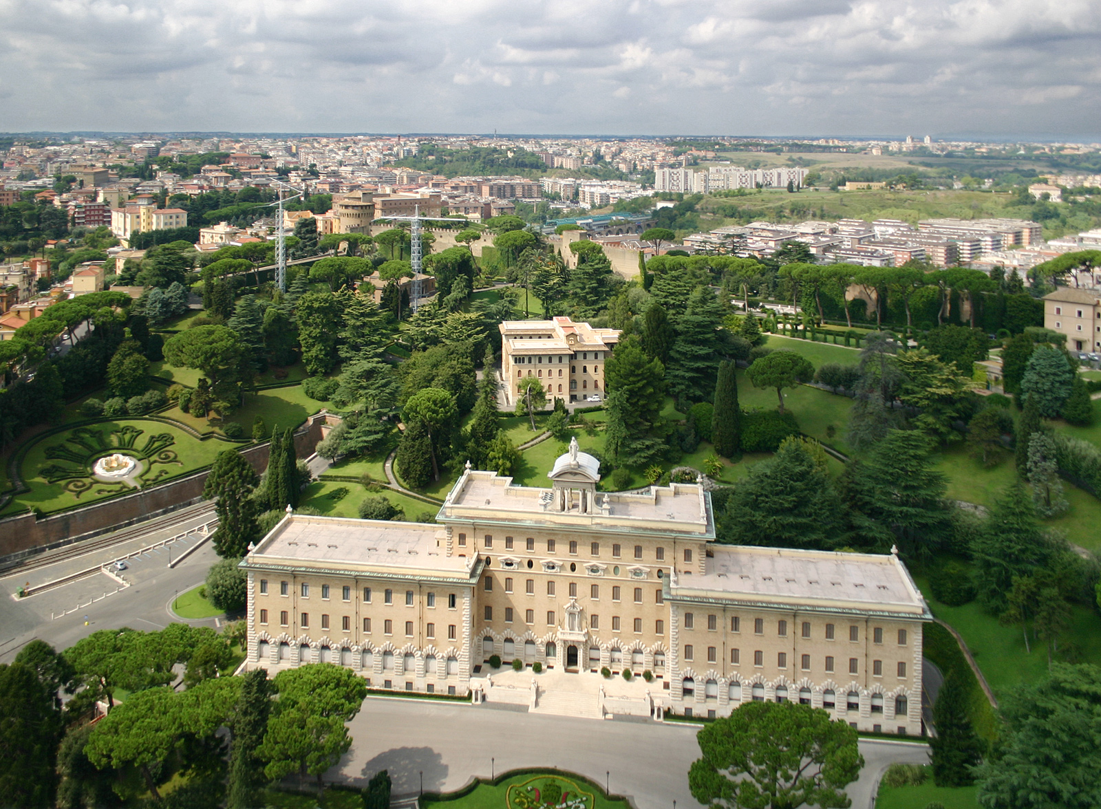 Blick auf den Regierungspalast und die Vatikanischen Gärten